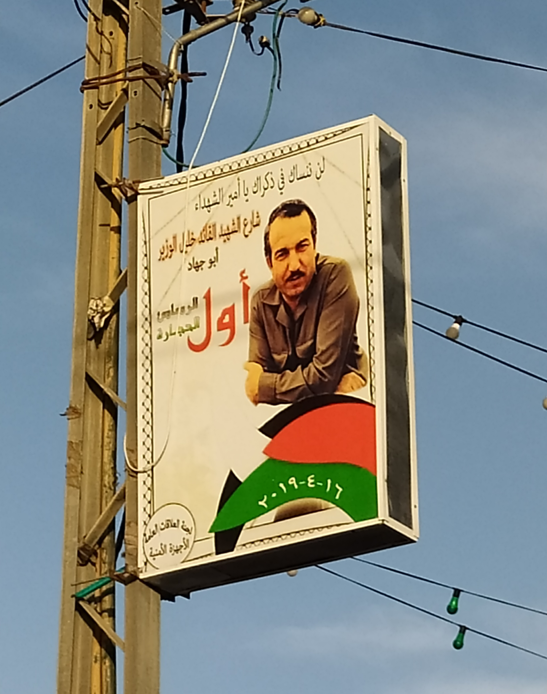 أرمة شارع أبو جهاد خليل الوزير في مدينة سلفيت